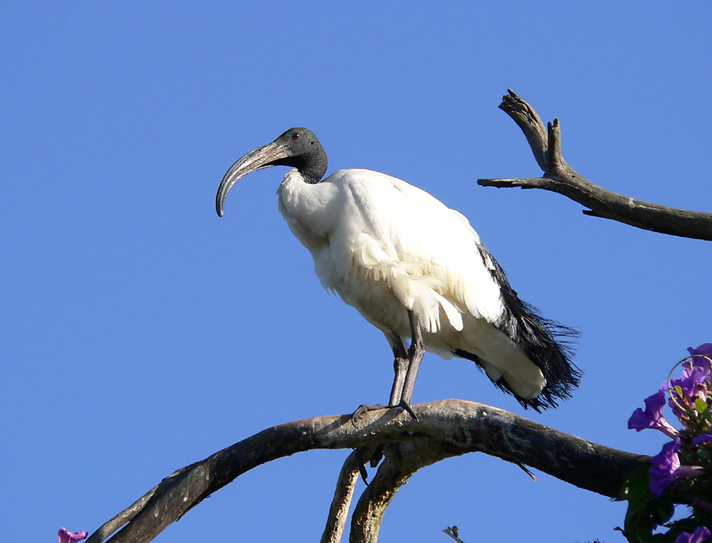 Photo taken by Christiaan Kooyman on 26 December 2005 in Nanyuki, Kenya.